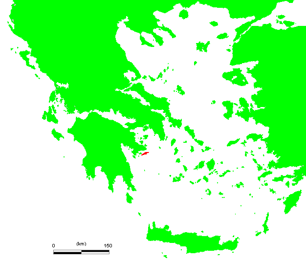 GR Hydra.PNG (Greek island)